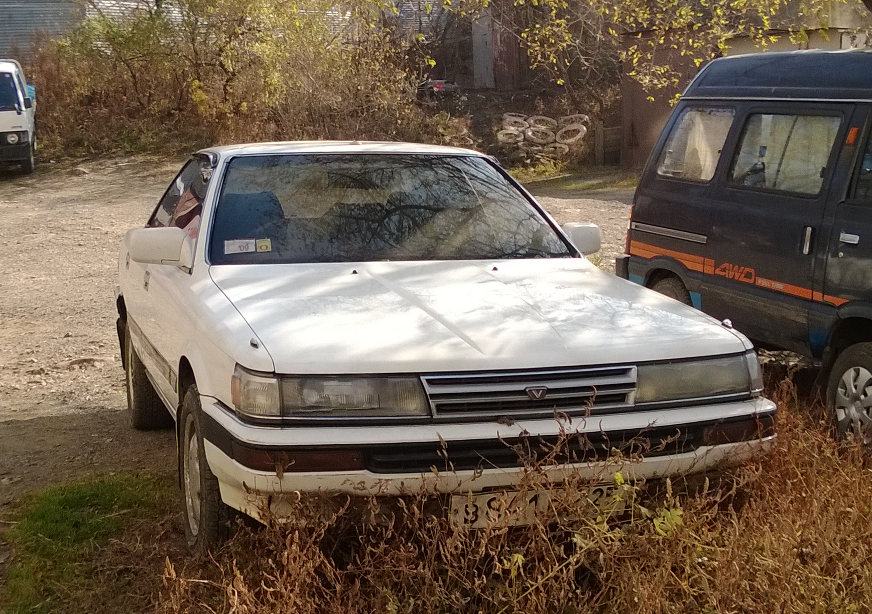 TOYOTA Vista SV21